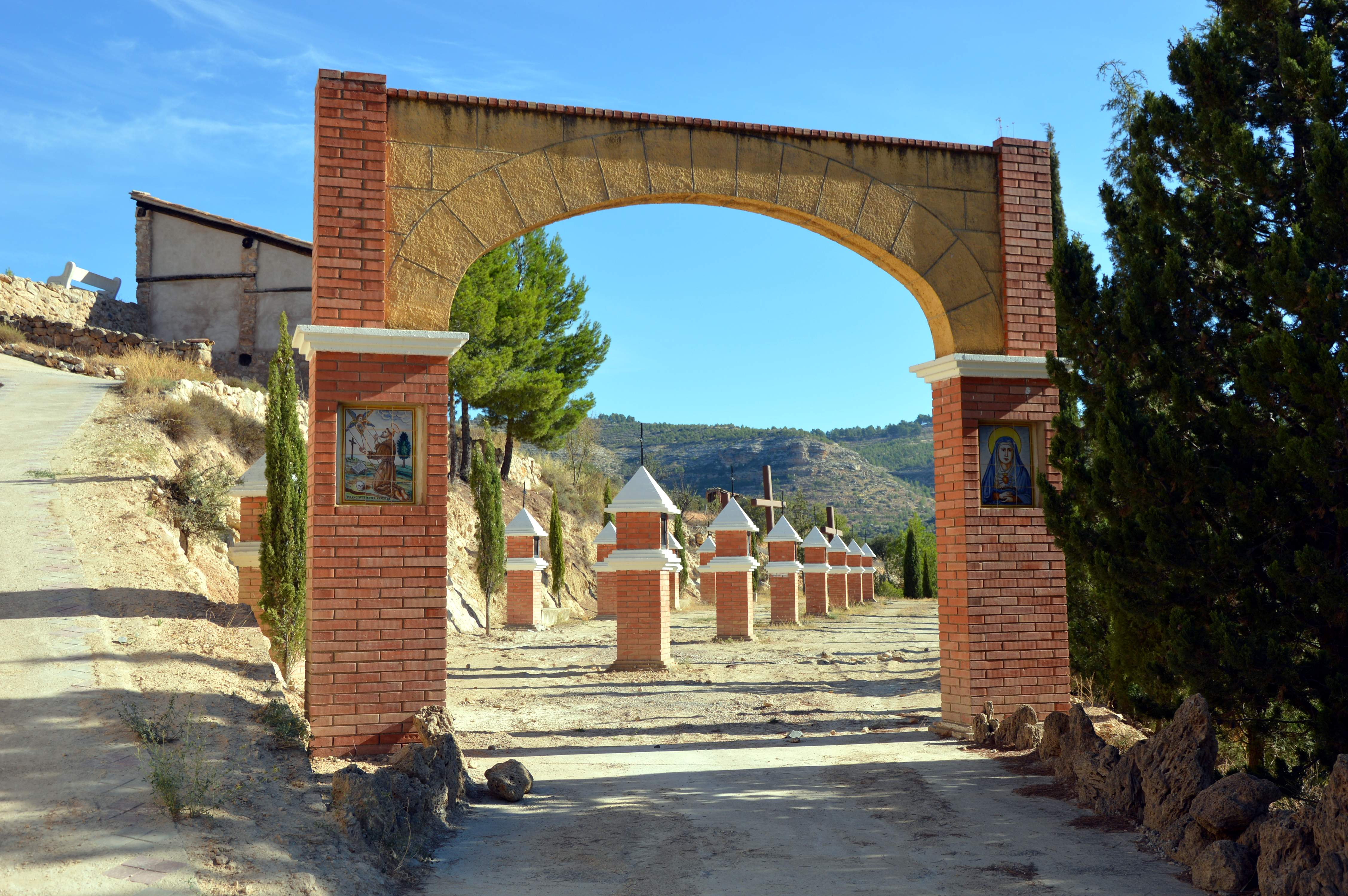 Detalle de la entrada al Vía Crucis de Casasaltas (Valencia).